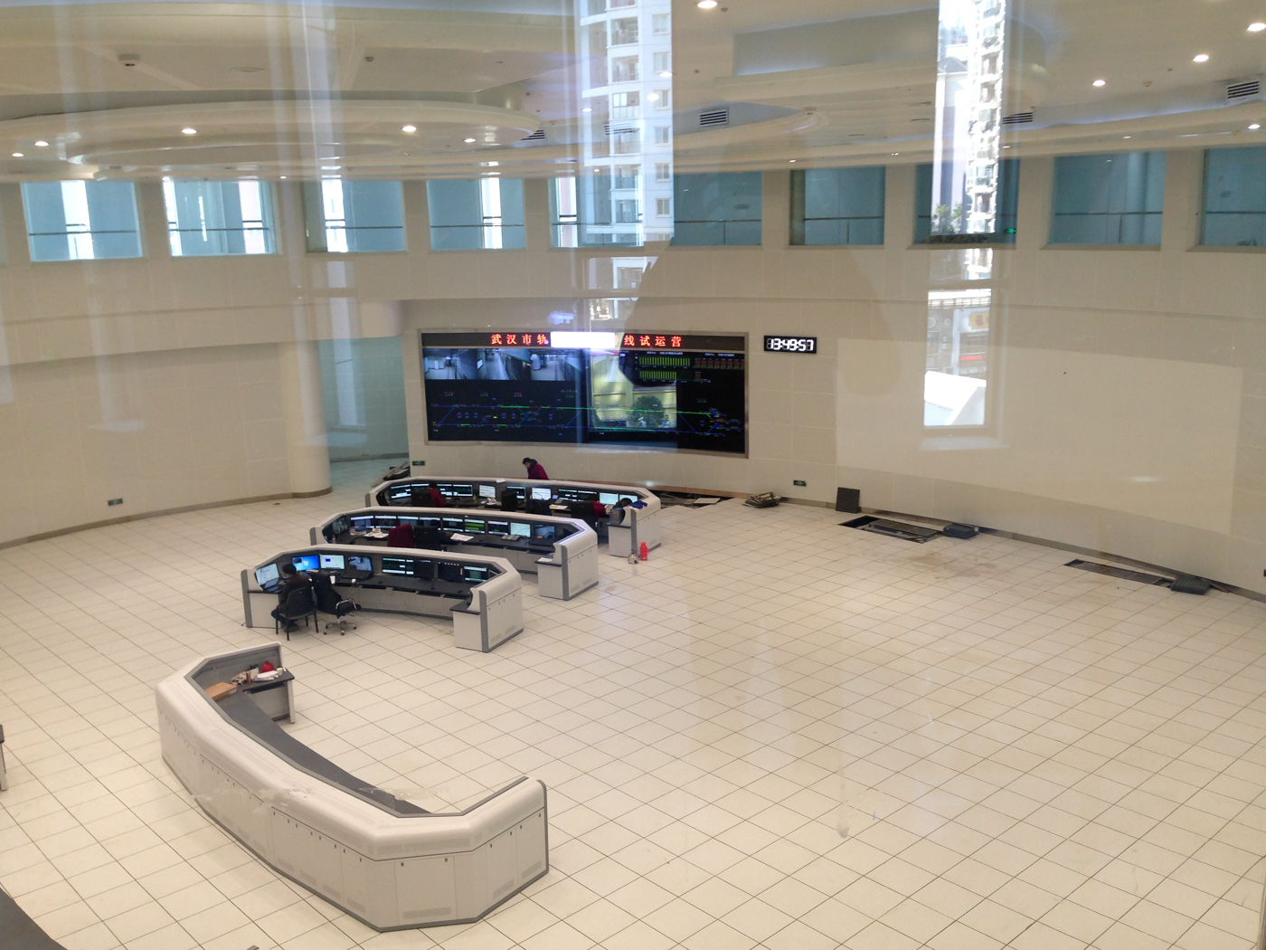 中文（中国大陆）: 武汉轨道交通线网服务管理中心控制大厅